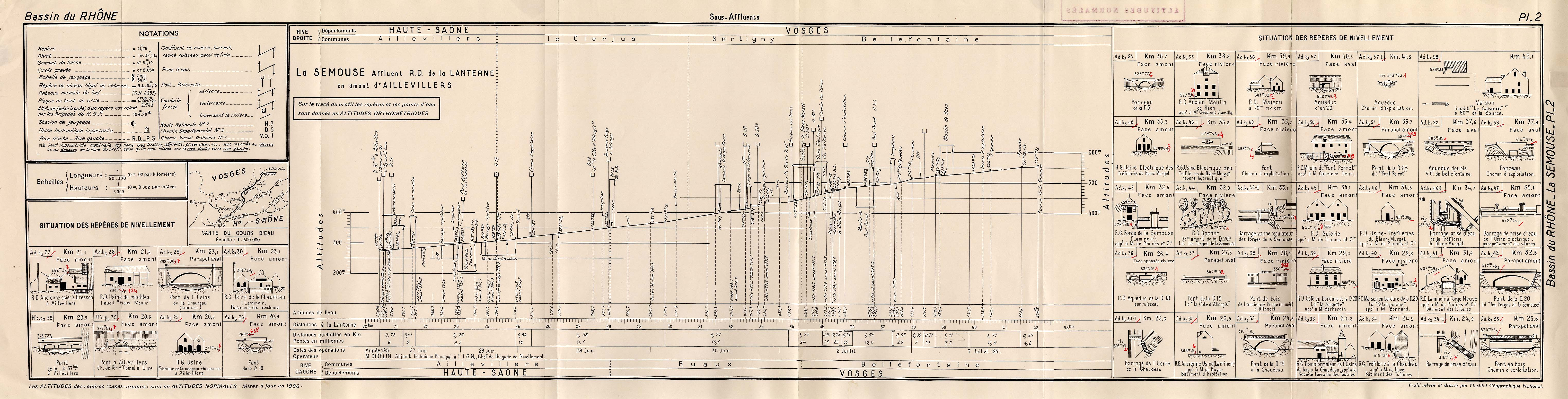 Profil altimètrique de la rivière Semouse entre sa source à Bellefontaine (88) et la commune de Aillevillers (70). Levé par M. Didelin, chef de Brigade nivellement à l'IGN